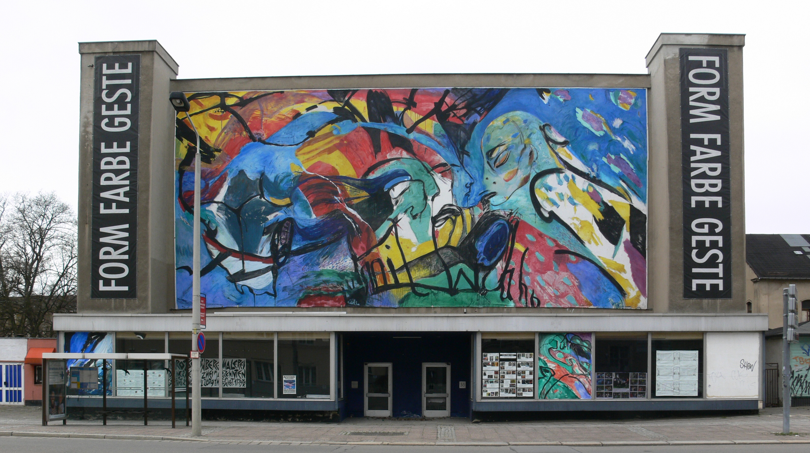 Chemnitz, Alte Aktienspinnerei an der Straße der Nationen (mit Bild von TM Rotschönberg von 2008)